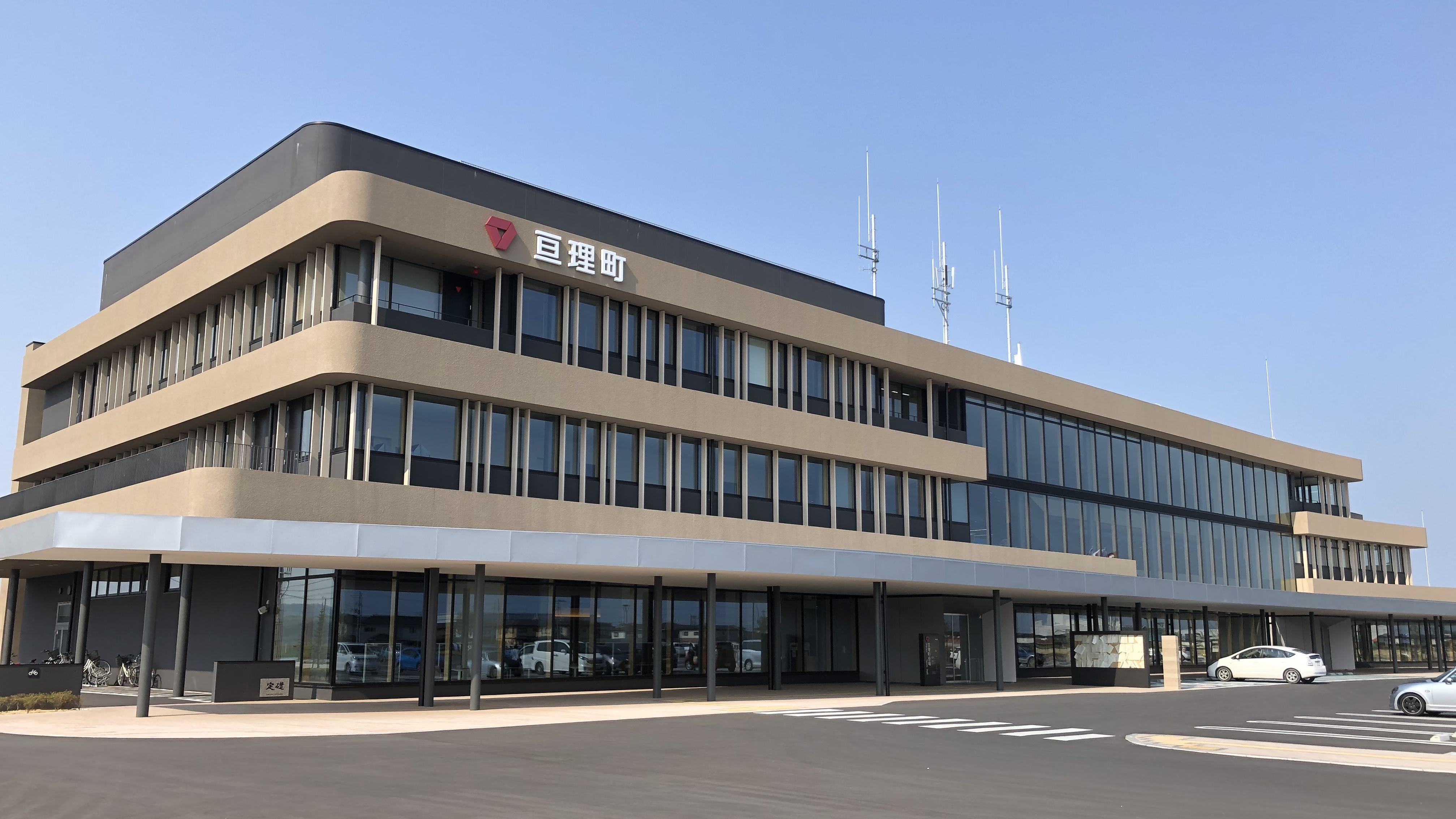 亘理町役場